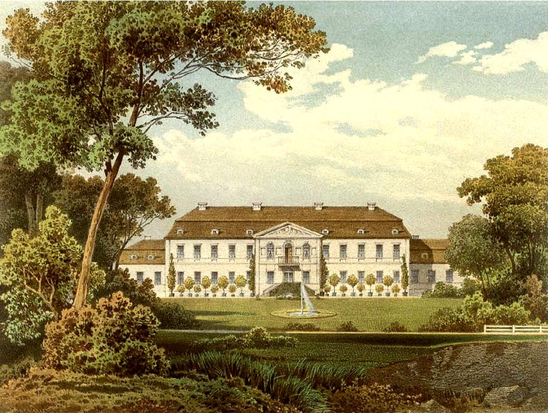 Schloss Suckow, Kreis Templin, Provinz Brandenburg